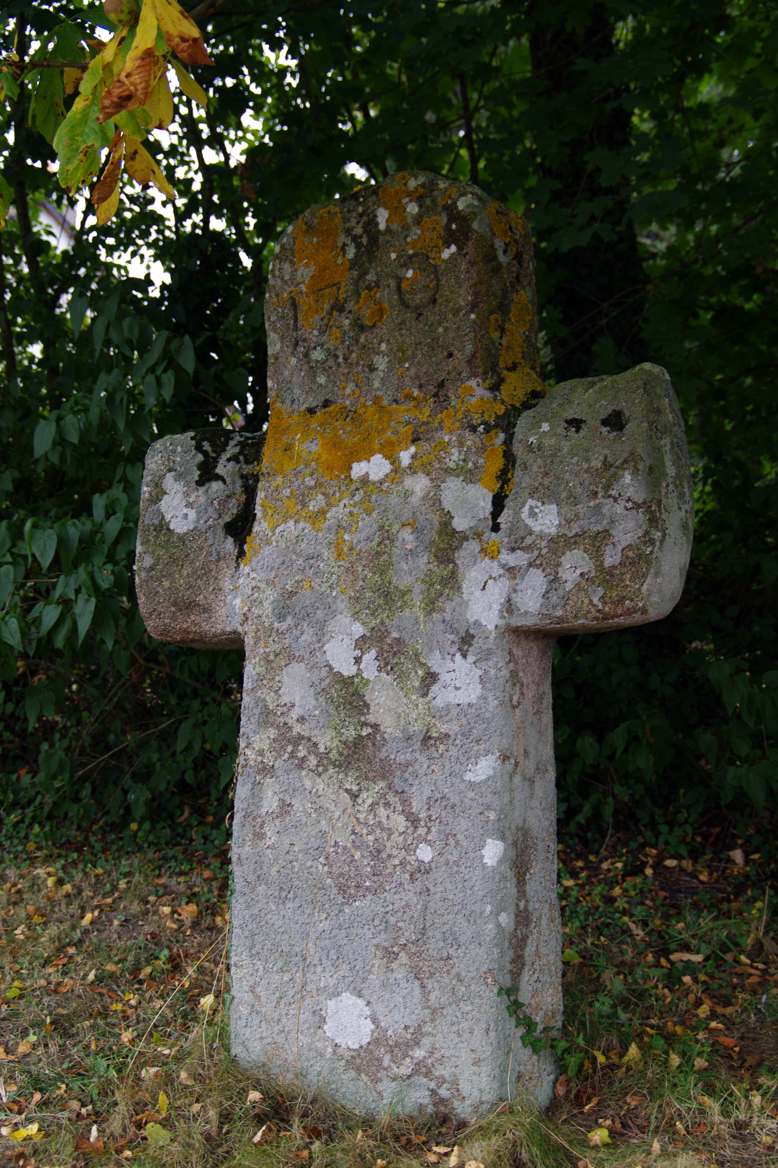 Croix monolithe, (Inscription, 1926) .